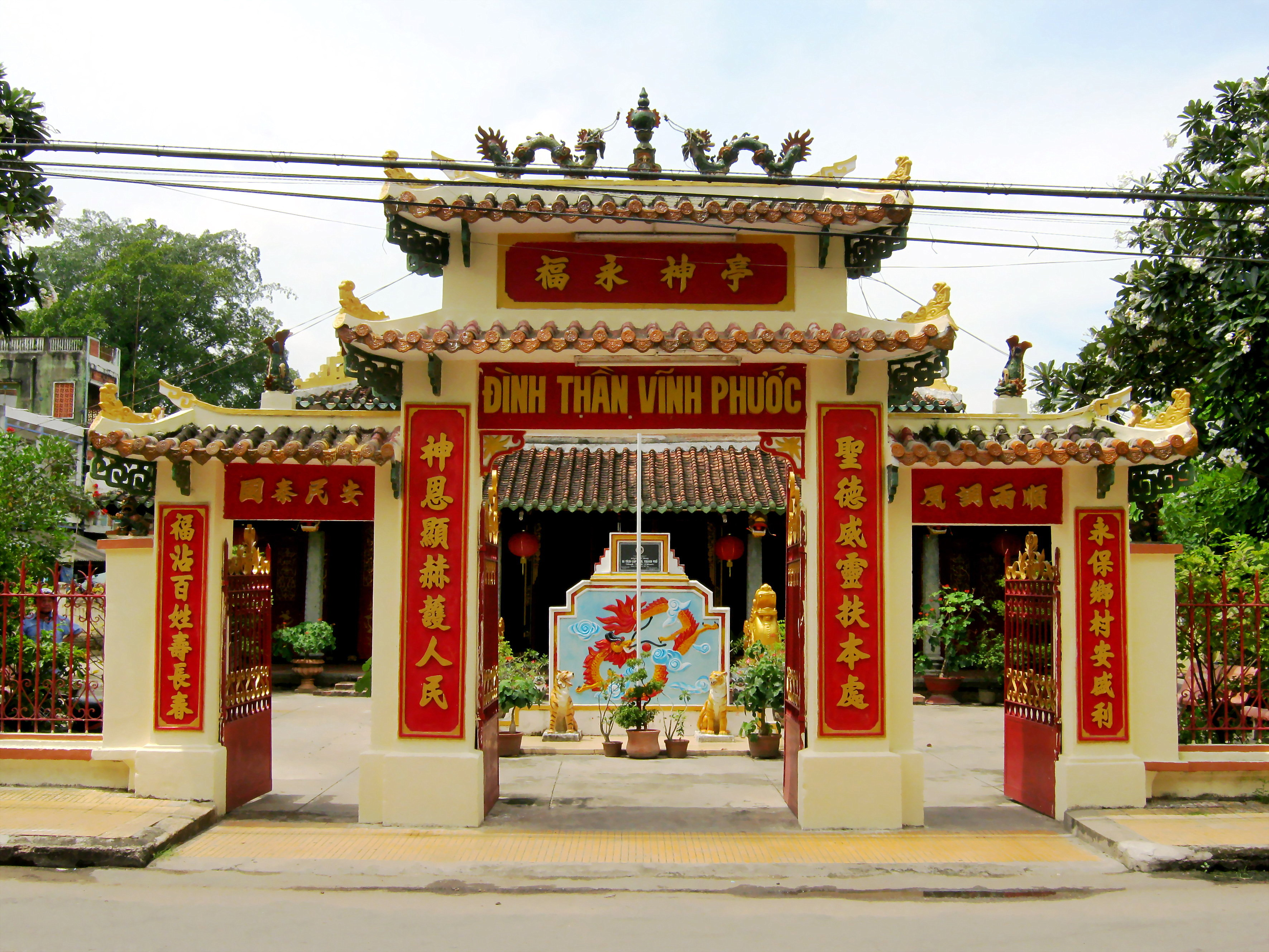 Đình Vĩnh Phước được lập ở nửa đầu thế kỷ 19 (bảng tiểu sử ở đình ghi đình lập năm 1807), hiện tọa lạc tại trên đường Trần Hưng Đạo, thuộc địa bàn phường 1, thành phố Sa Đéc (Đồng Tháp, Việt Nam). Ban đầu, đình thờ Thành hoàng bổn cảnh; về sau thờ thêm Tống Phước Hòa (? - 1777), là một danh tướng thời chúa Nguyễn Phúc Thuần và chúa Nguyễn Phúc Dương, từng được giao coi giữ Đông Khẩu đạo (tức vùng Sa Đéc ngày nay).